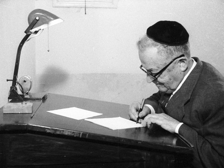 ש"י עגנון, 1966